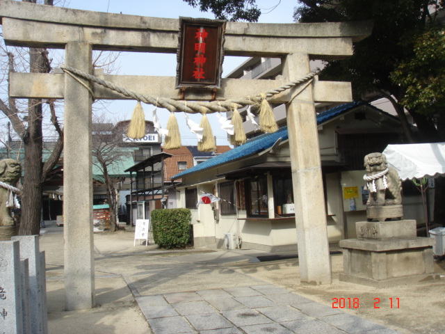 堺市の神明神社（鳥居）